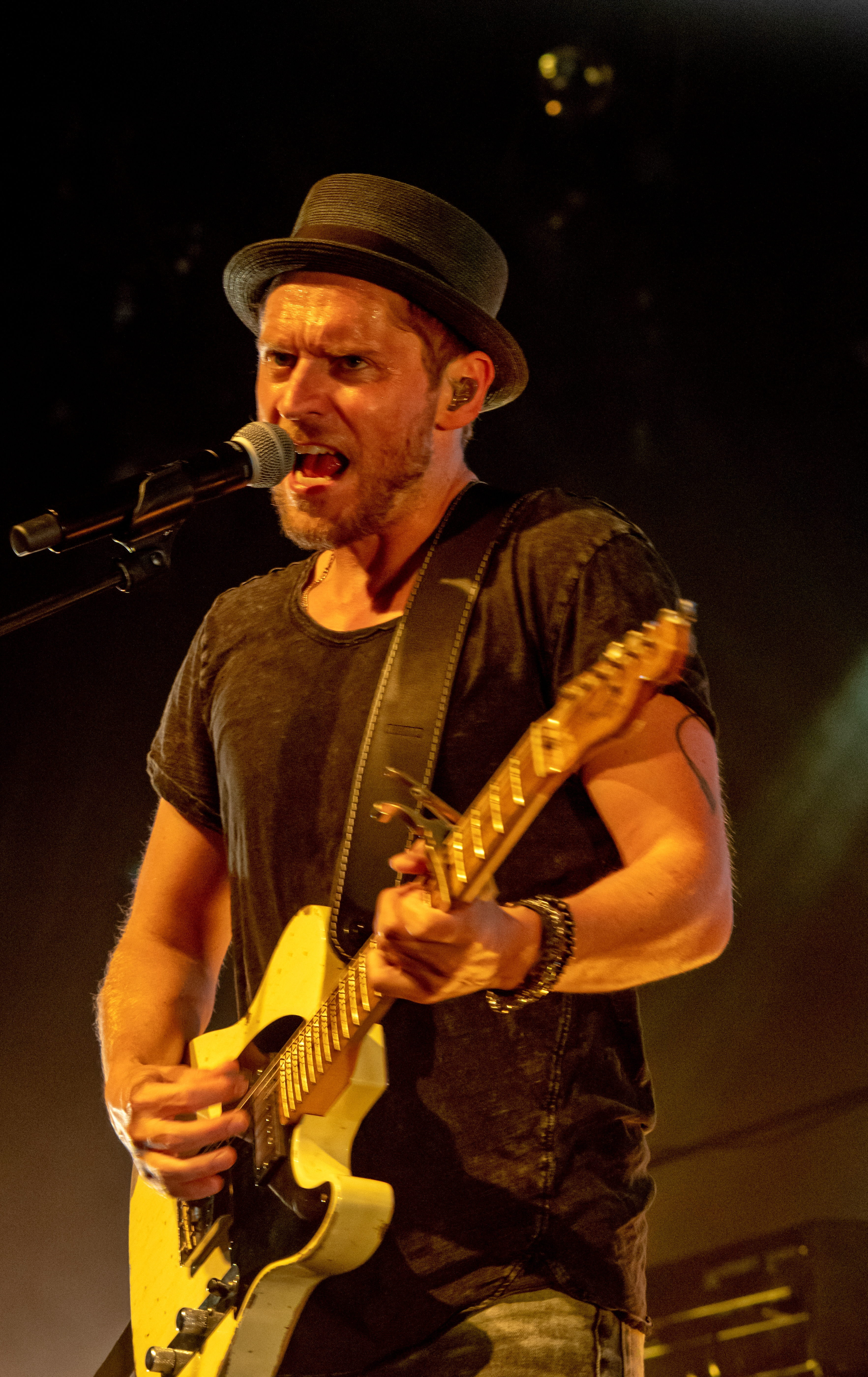 Bilder vom Zelt Musik Festival 2018 in Freiburg im Breisgau Johannes Oerding und Band am 30.07.2018